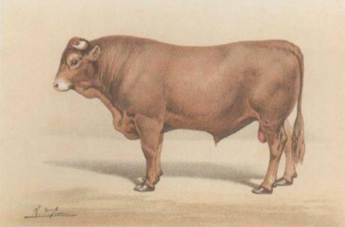 Cette planche est issue de l'ouvrage "Animaux de la ferme" publié en 1863 par Victor Borie. Elle représente un taureau limousin.